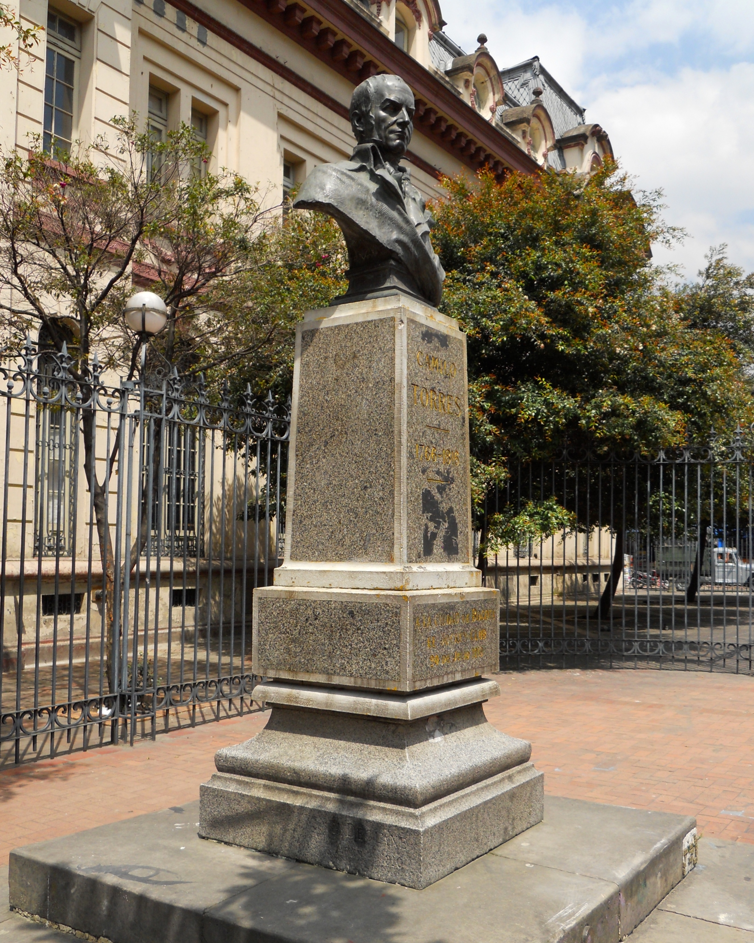 Busto de Camilo Torres, en la ESAP, barrio La Capuchina. Bogptá.